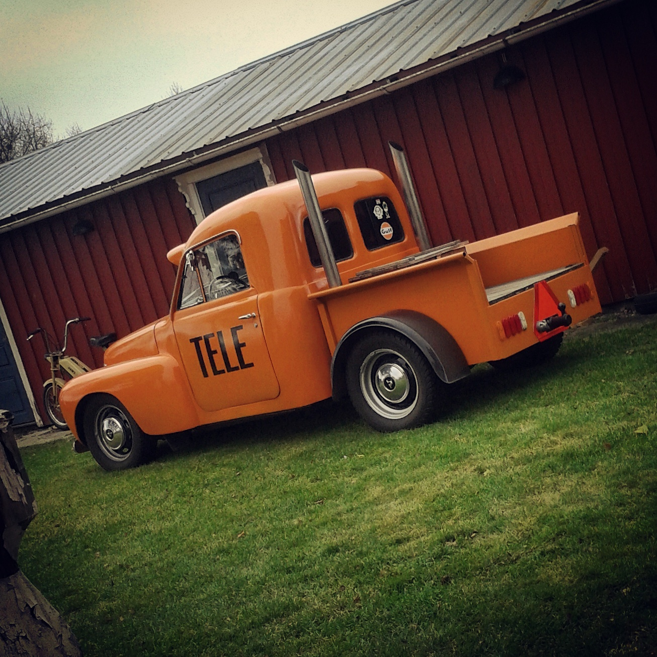 Duett